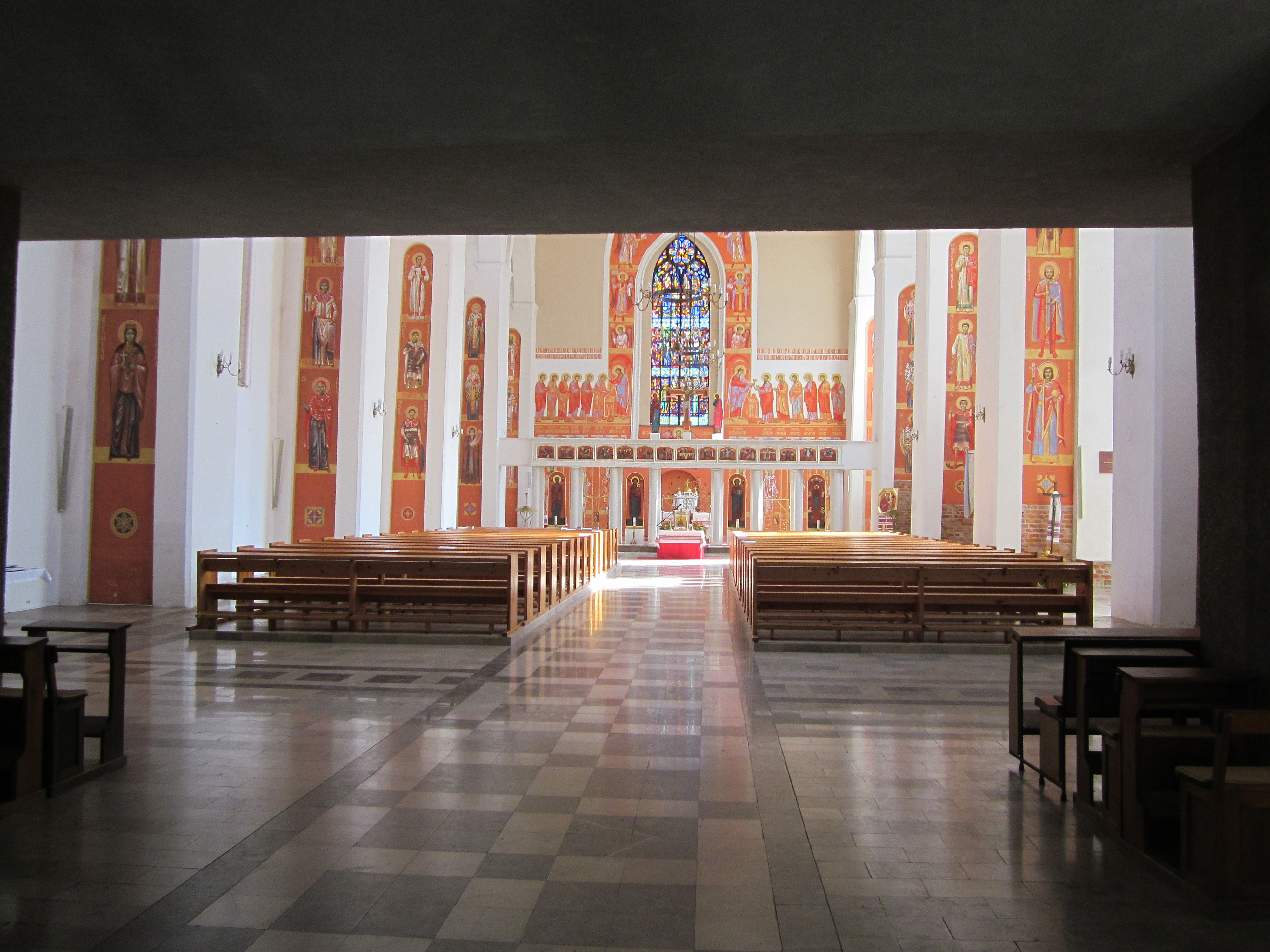 Gdańsk Stare Miasto, ul. Zaułek św. Bartłomieja 1 - Konkatedra greckokatolicka św. Bartłomieja i Opieki Najświętszej Bogurodzicy, 1486-1494, po 1945